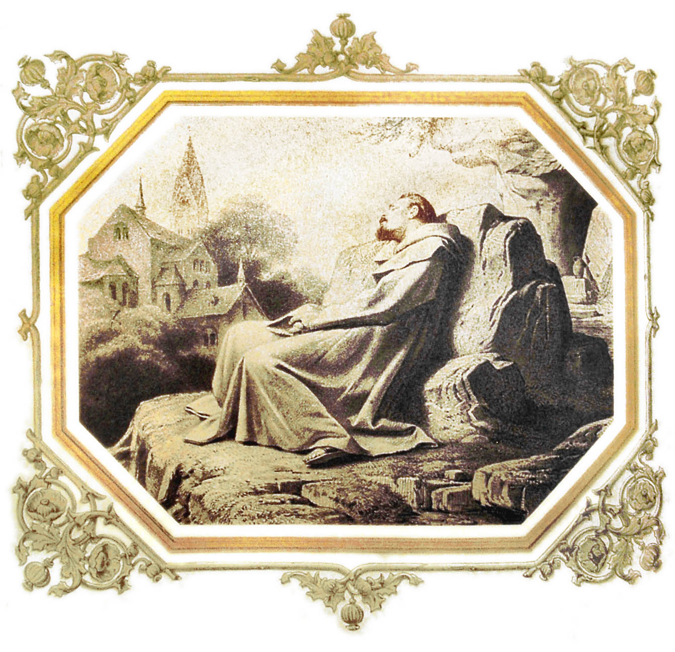 Illustration in der Prachtausgabe von Schillers Gedichten 1859, S. 366